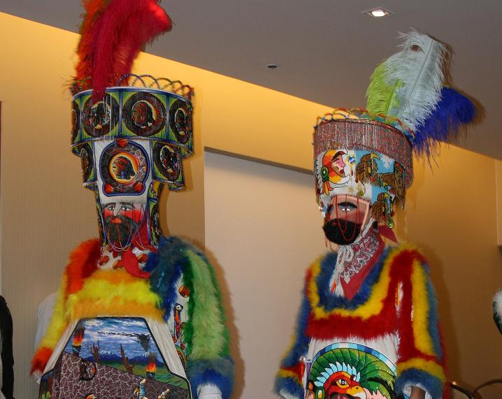 Traje folklórico de Chinelos del estado de Morelos